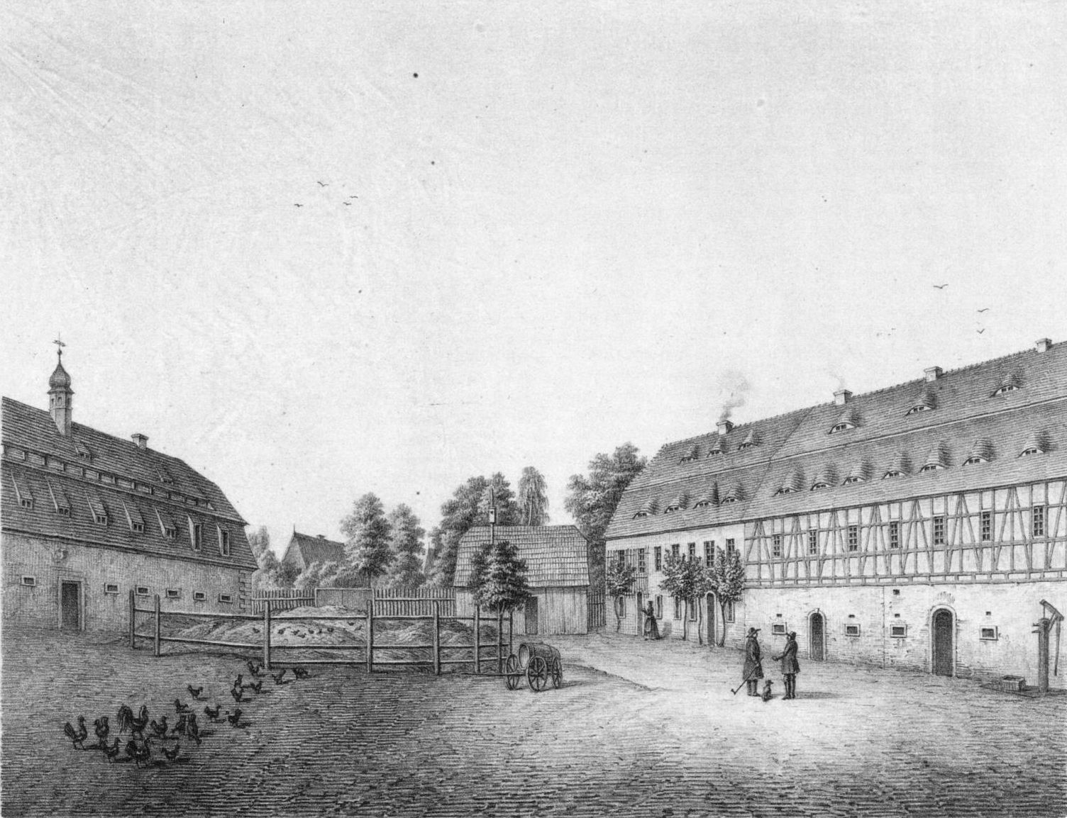 Rittergut Venusberg im Erzgebirge um 1860